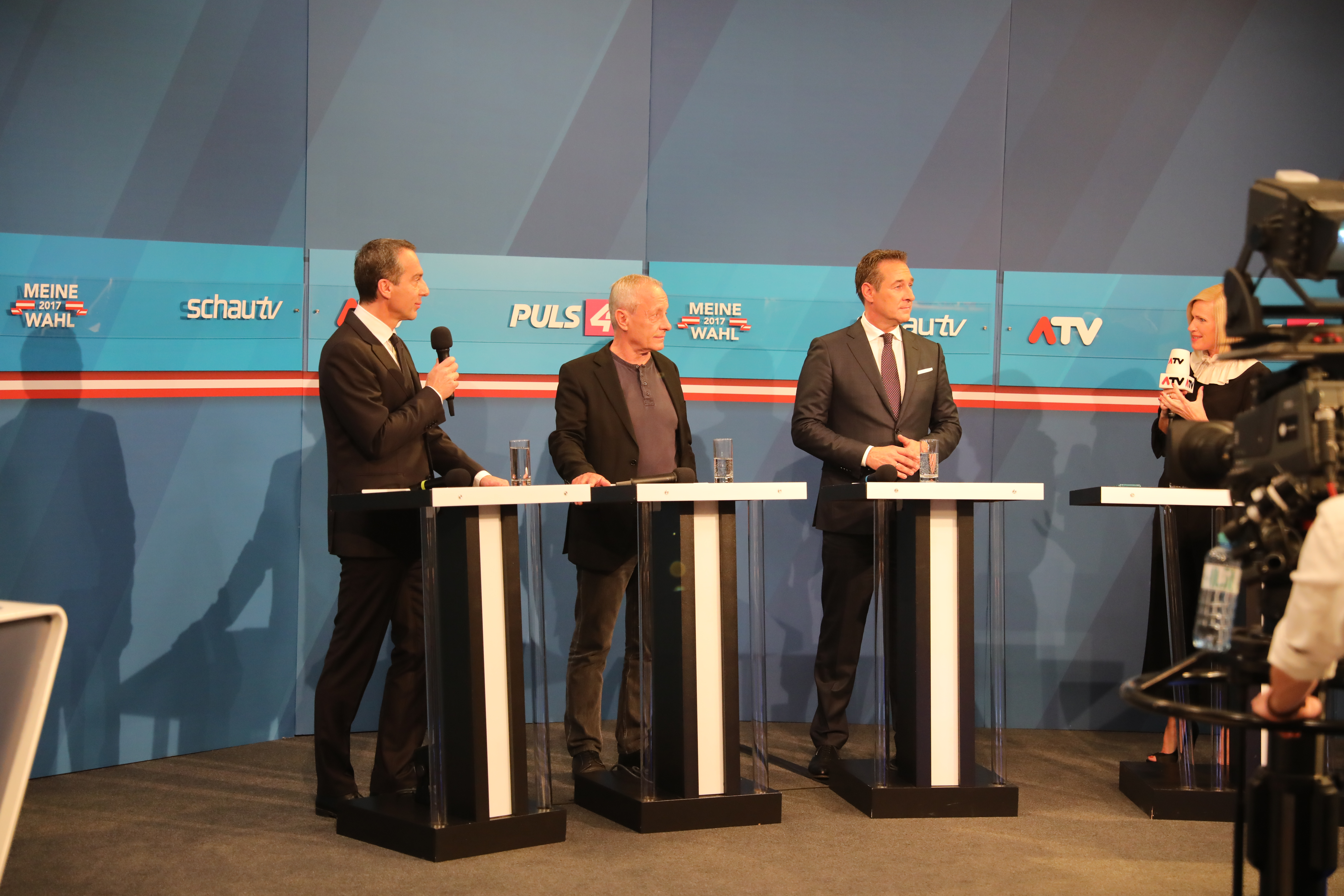 im Festzelt bei einer Ansprache nach dem vorläufigen Endergebnis (Fotos: SPÖ/Zach-Kiesling).